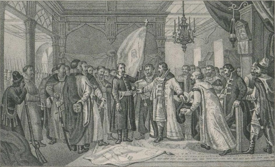 Принятие боярином Бутурлиным присяги от гетмана Богдана Хмельницкого и Малороссии на подданство России.